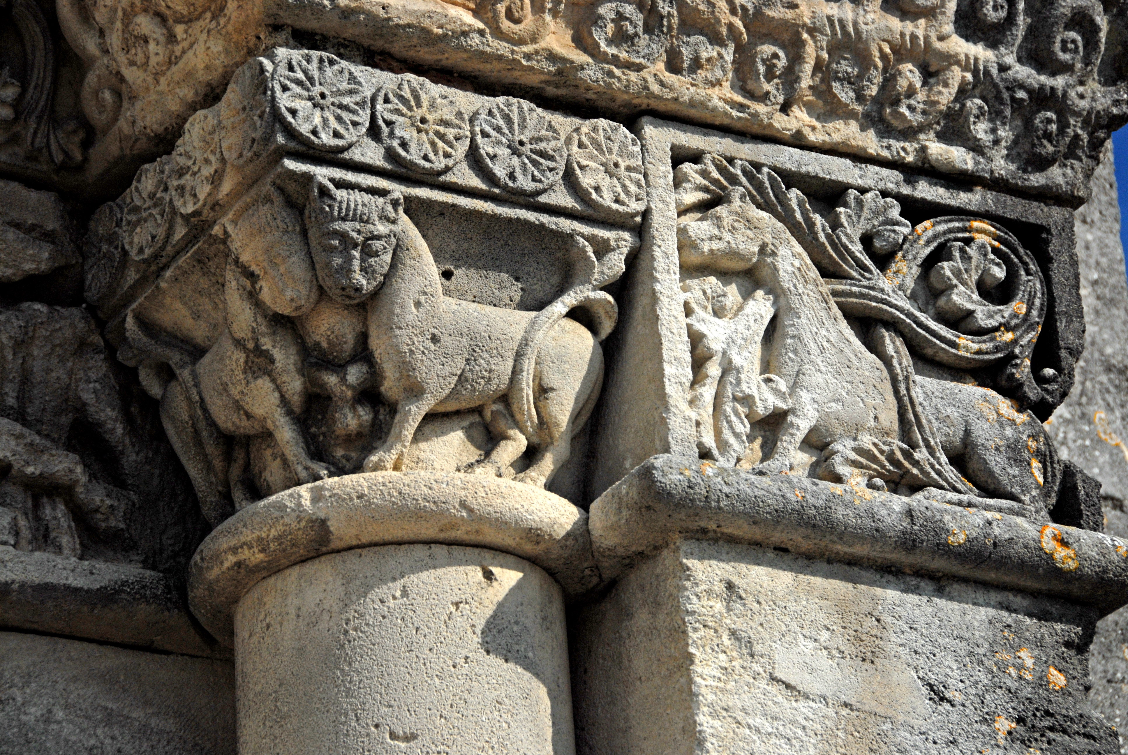 Genzac-la-Pallue, Kapitelle, rechtes Scheinportal, rechts